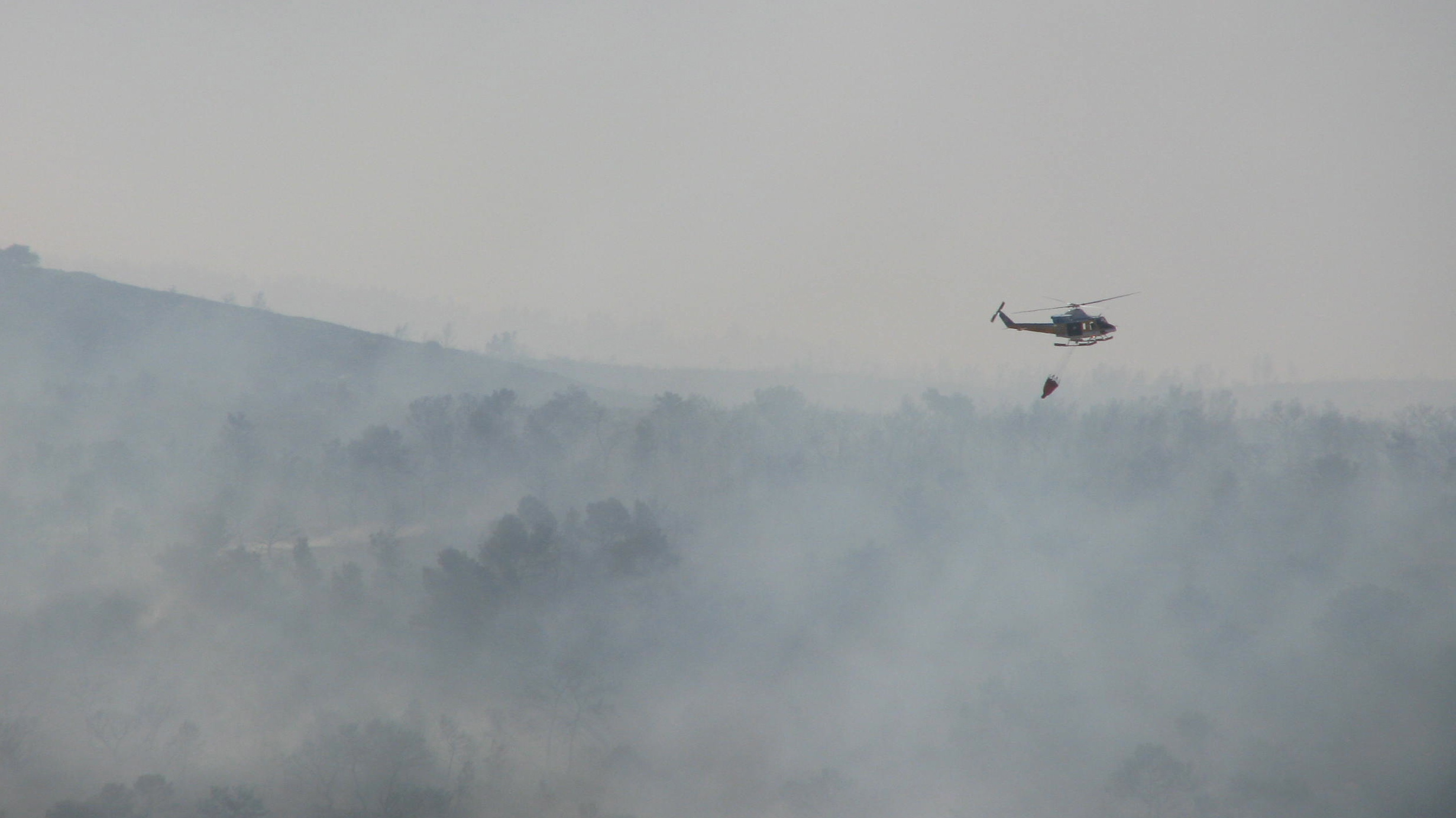 מסוק בל 412EP של משטרת קפריסין על רקע השריפה הגדולה בכרמל (2010).